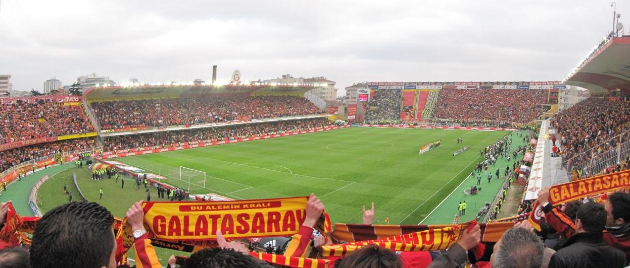 Galatasaray-Fenerbahçe_12.04.2009.jpg